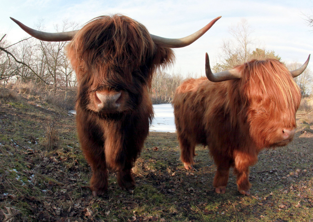 Schotse hooglander in Nationaal Park Zuid-Kennemerland